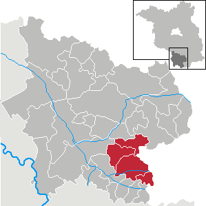 Amt Plessa in Brandenburg (Country) - District Elbe-Elster